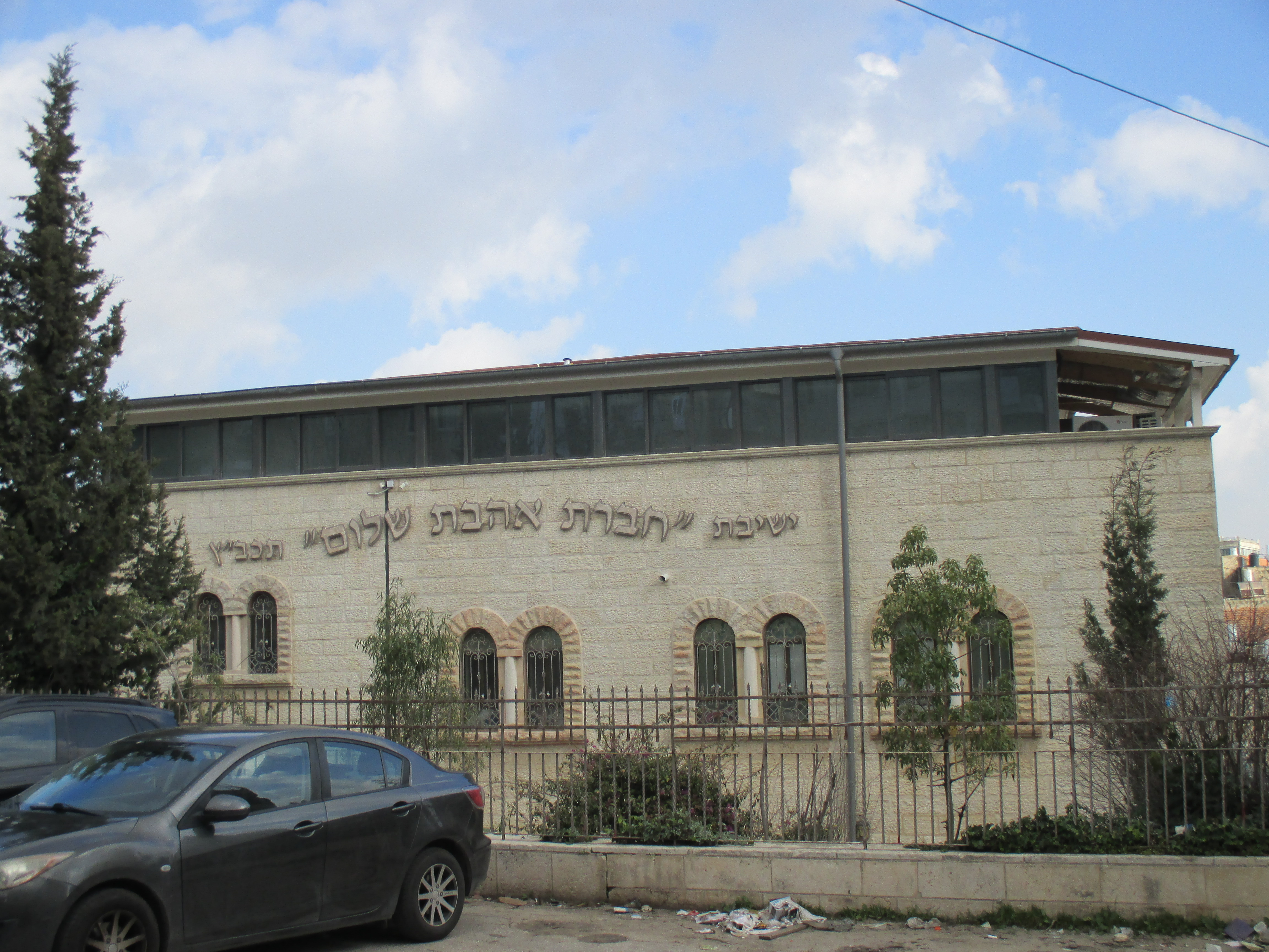 ישיבת חברת אהבת שלום בירושלים